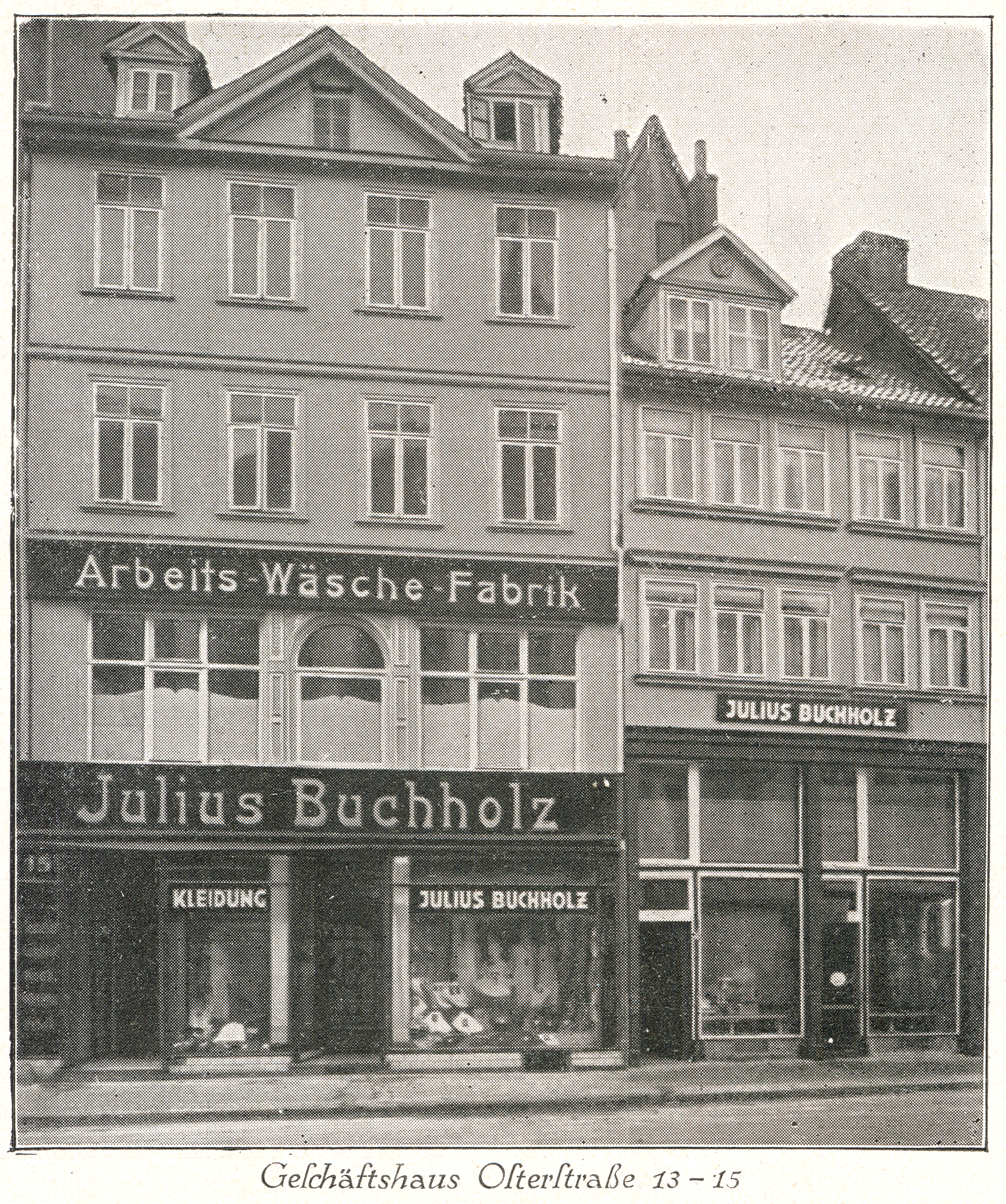 Blick auf die beiden 1906 zu einem Betrieb zusammengelegten Wohn- und Geschäftshäuser unter der - damaligen - Adresse Osterstraße 13-15 in Hannover, Sitz des Unternehmens Julius Buchholz, Berufswäschefabrik, zugleich "Erstes Versandhaus für Fleischerei-Bedarfsartikel" ...